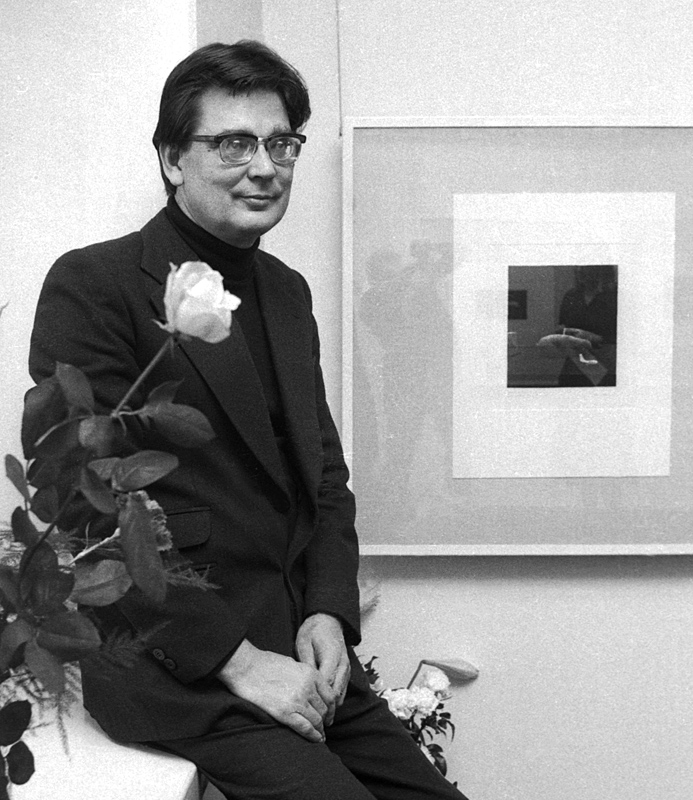 Pentti Kaskipuro näyttelynsä avajaisissa